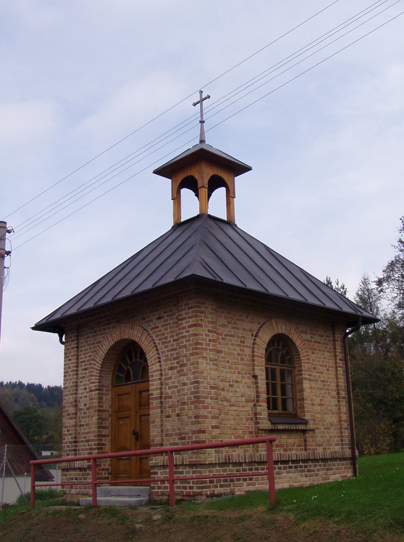 Kaple v Janově